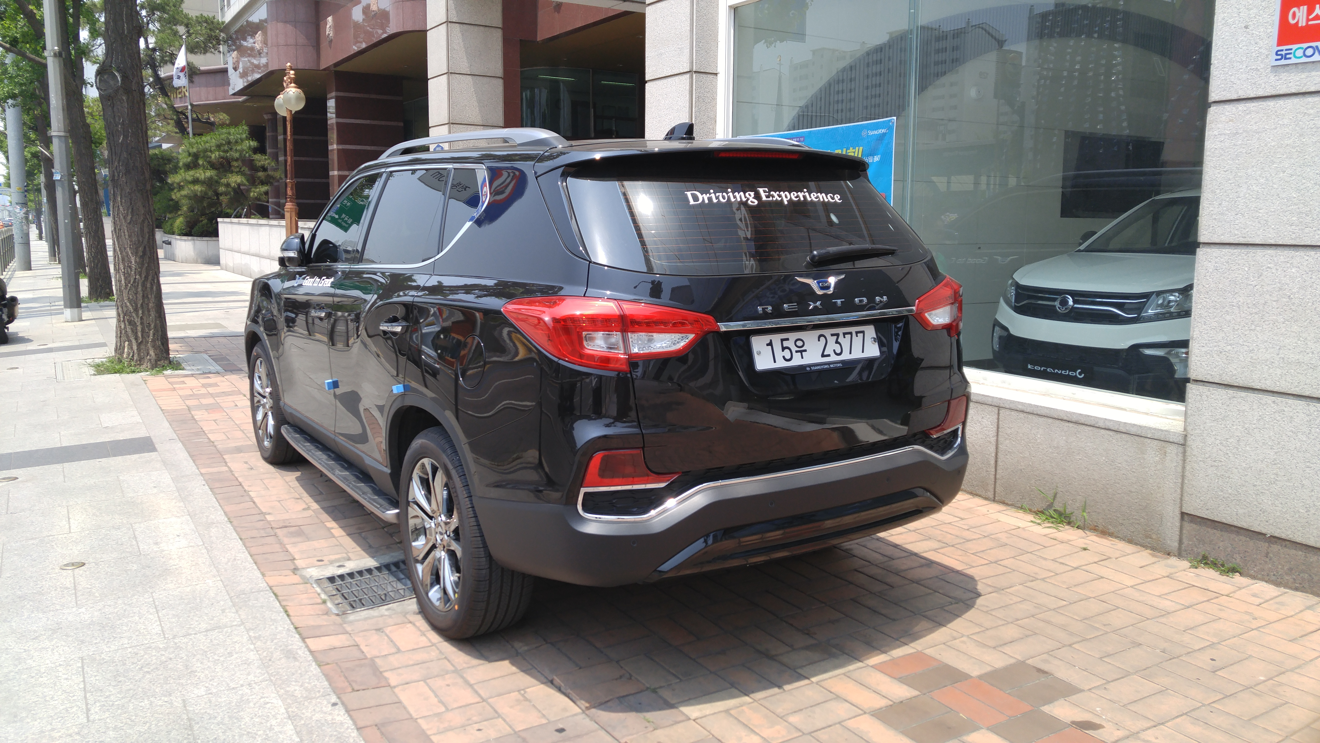 サンヨンレクストン